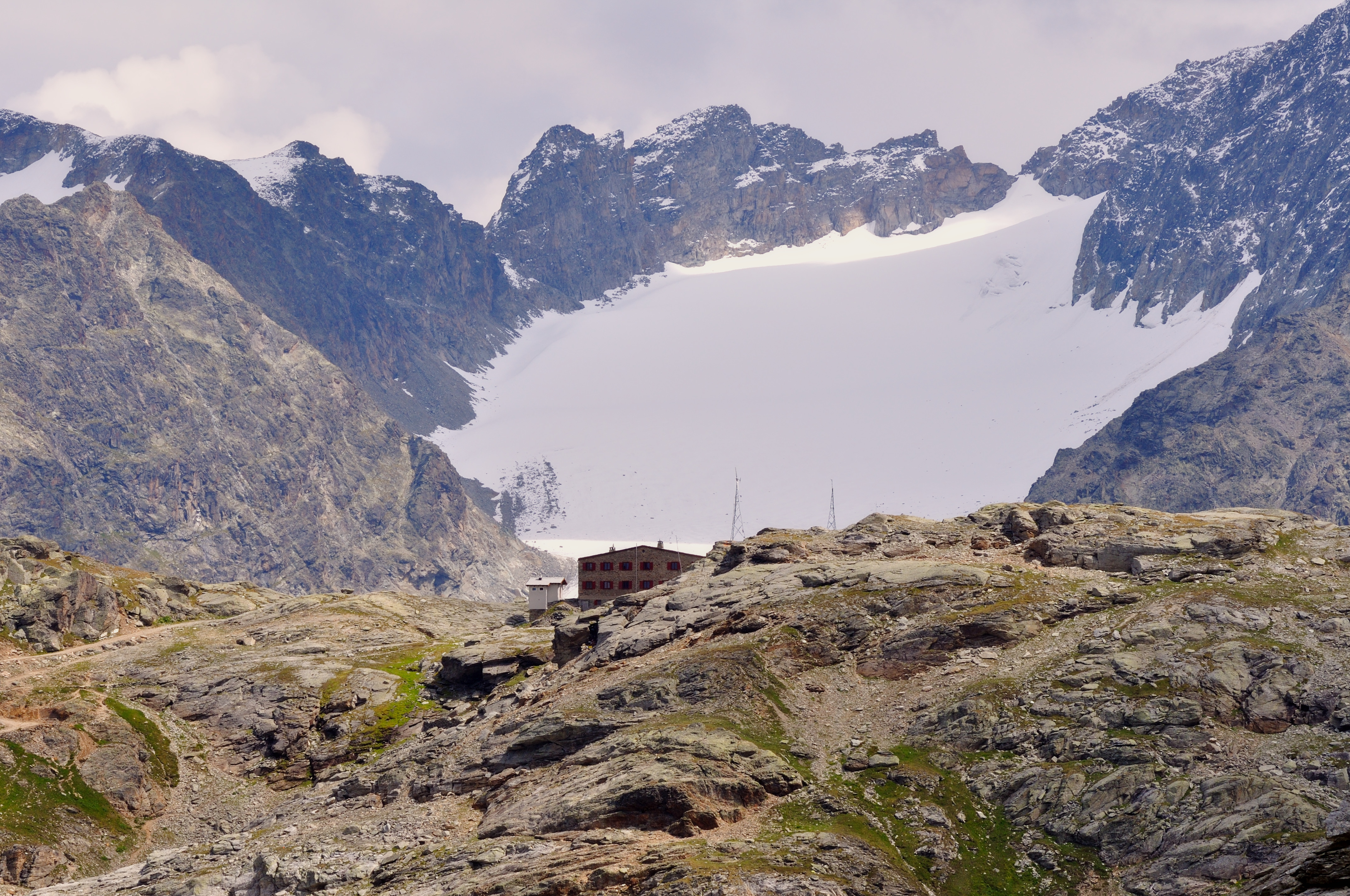 Switzerland, Graubünden, view from Murtèl station (2699 m)